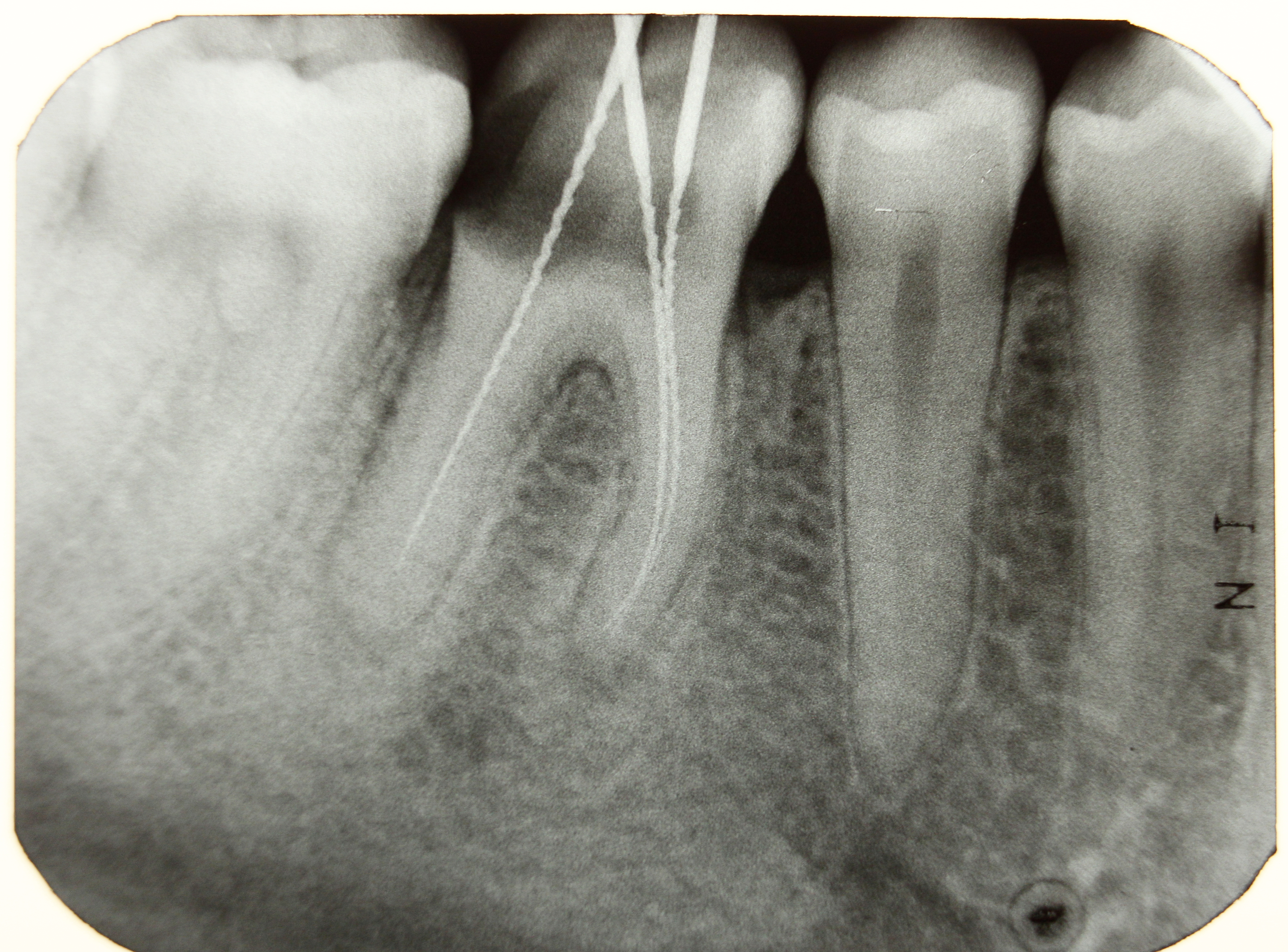 Dental X-ray